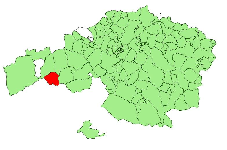 Balmaseda